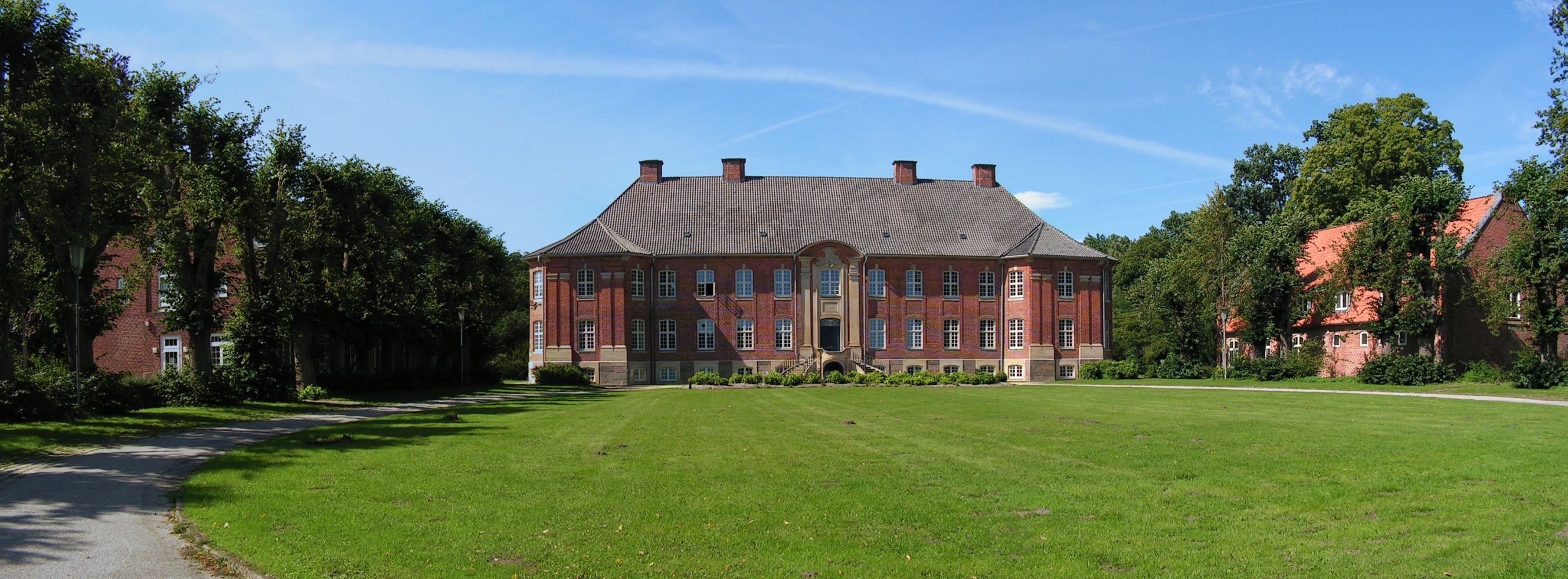 Borstel (Holstein) Herrenhaus Panorama